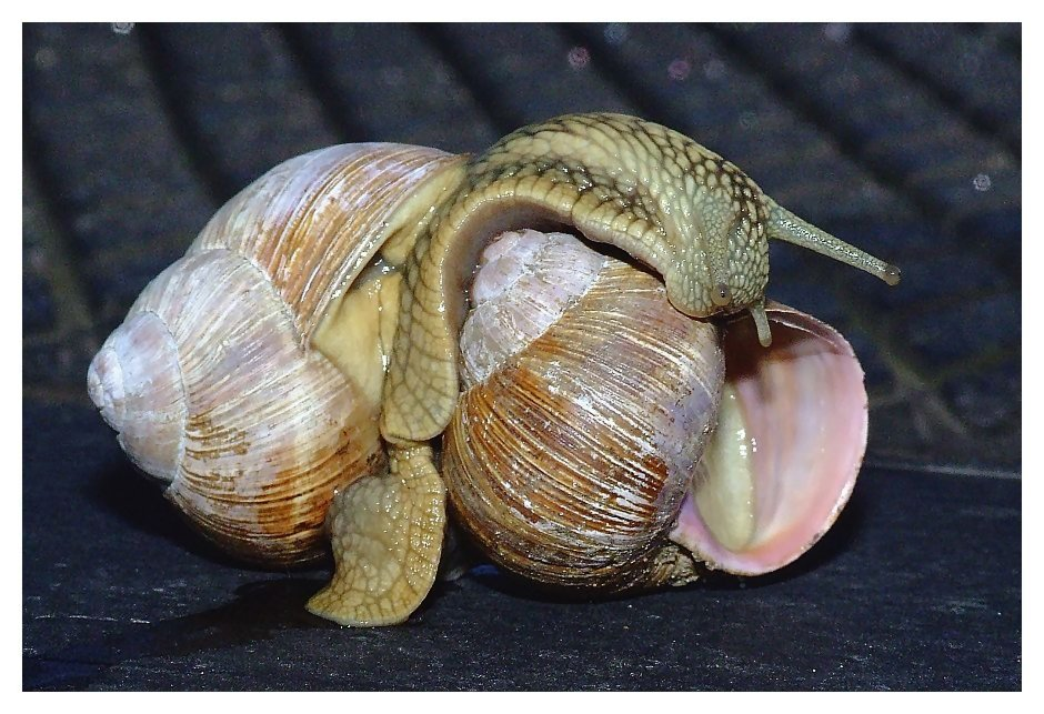 Helix pomatia